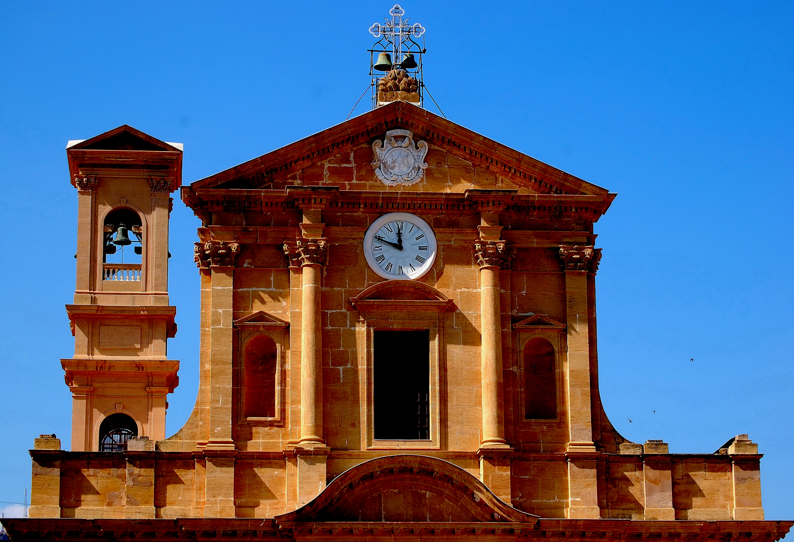 Bagheria (PA), ITA